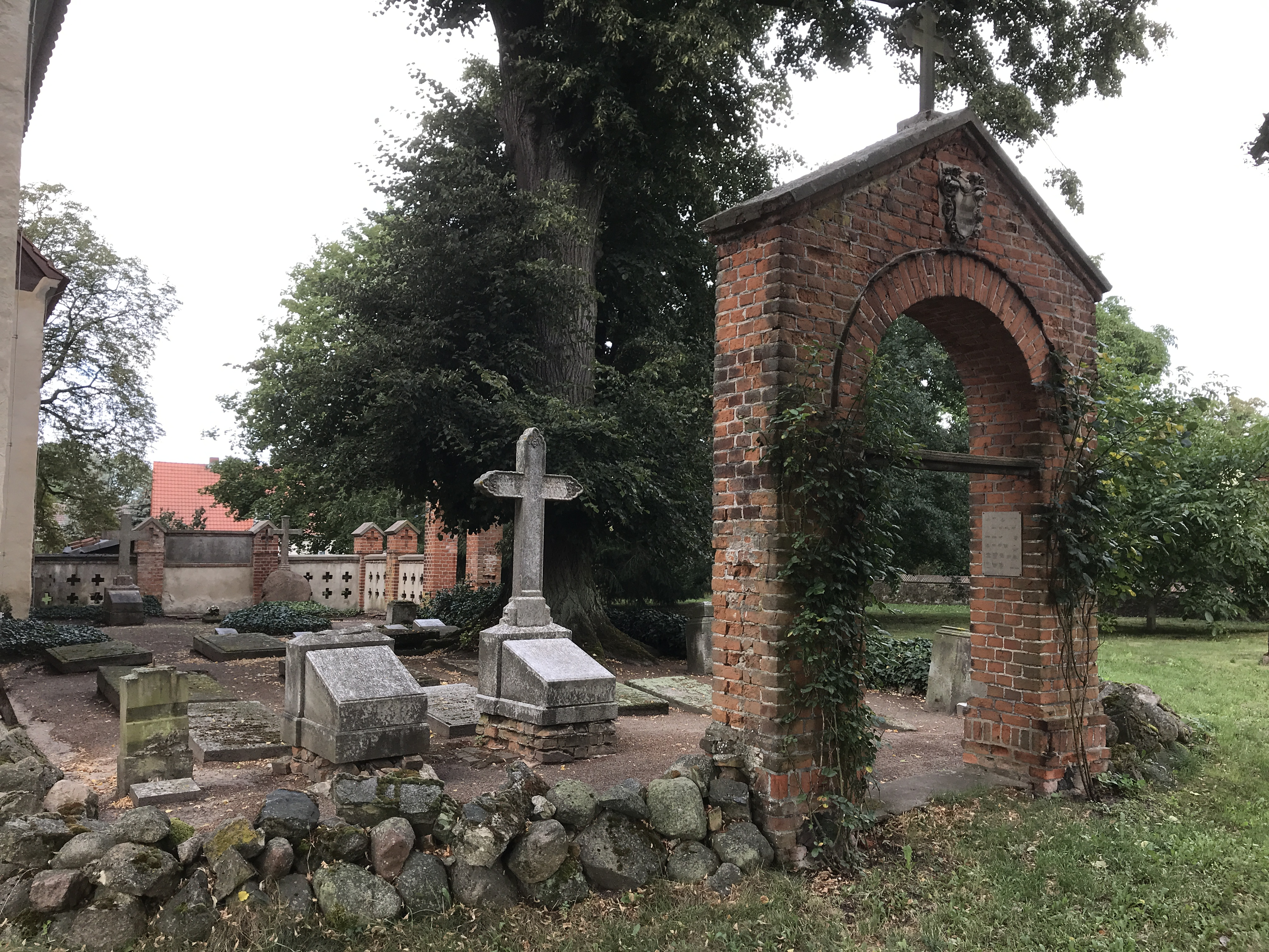 Die Dorfkirche Steinhöfel im Landkreis Oder-Spree in Brandenburg ist eine Feldsteinkirche aus der zweiten Hälfte des 13. Jahrhunderts. Im Innern steht unter anderem ein Altaraufsatz aus dem Anfang des 18. Jahrhunderts.